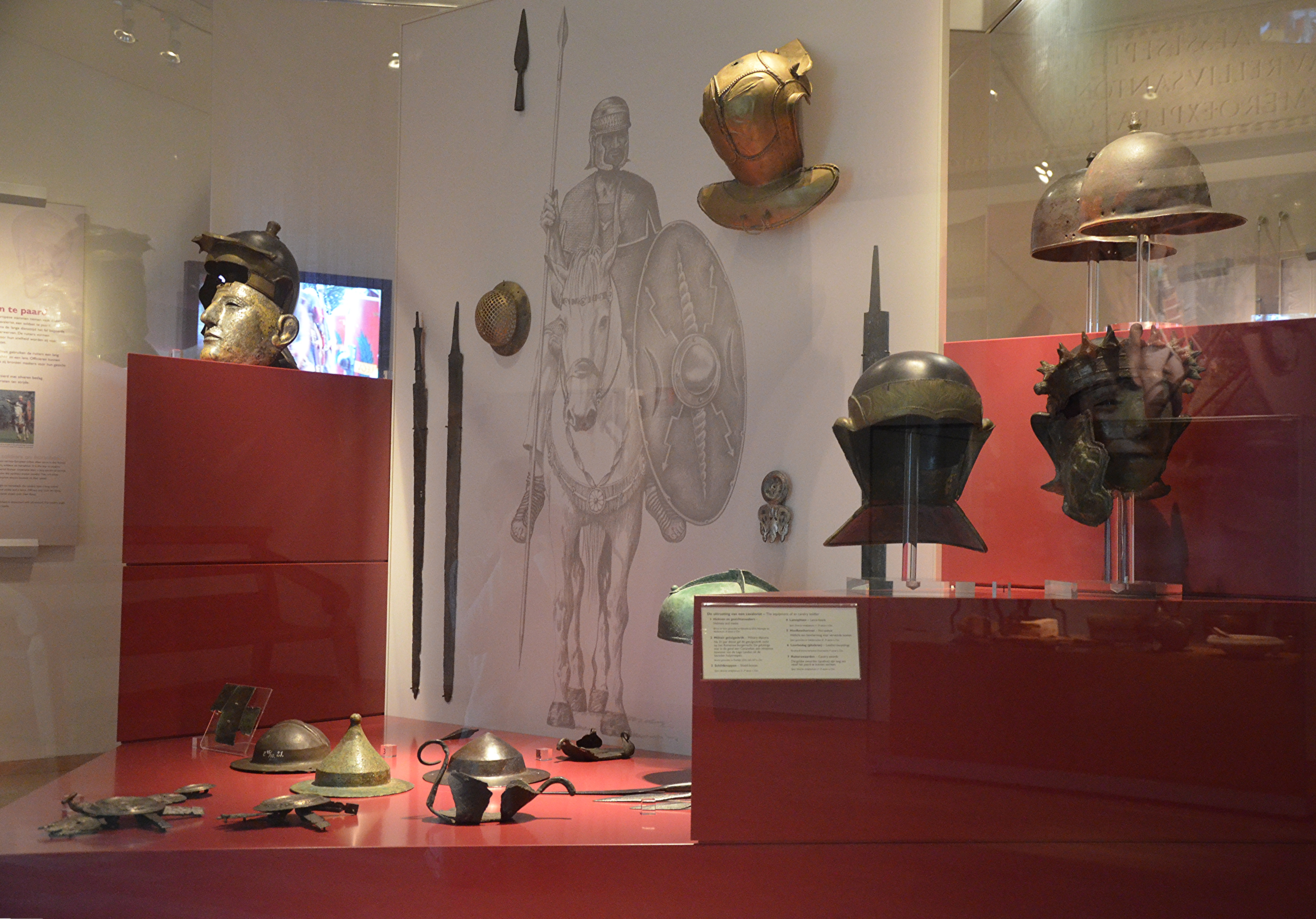 The equipment of a cavalry soldier, Rijksmuseum van Oudheden, Leiden, Netherlands